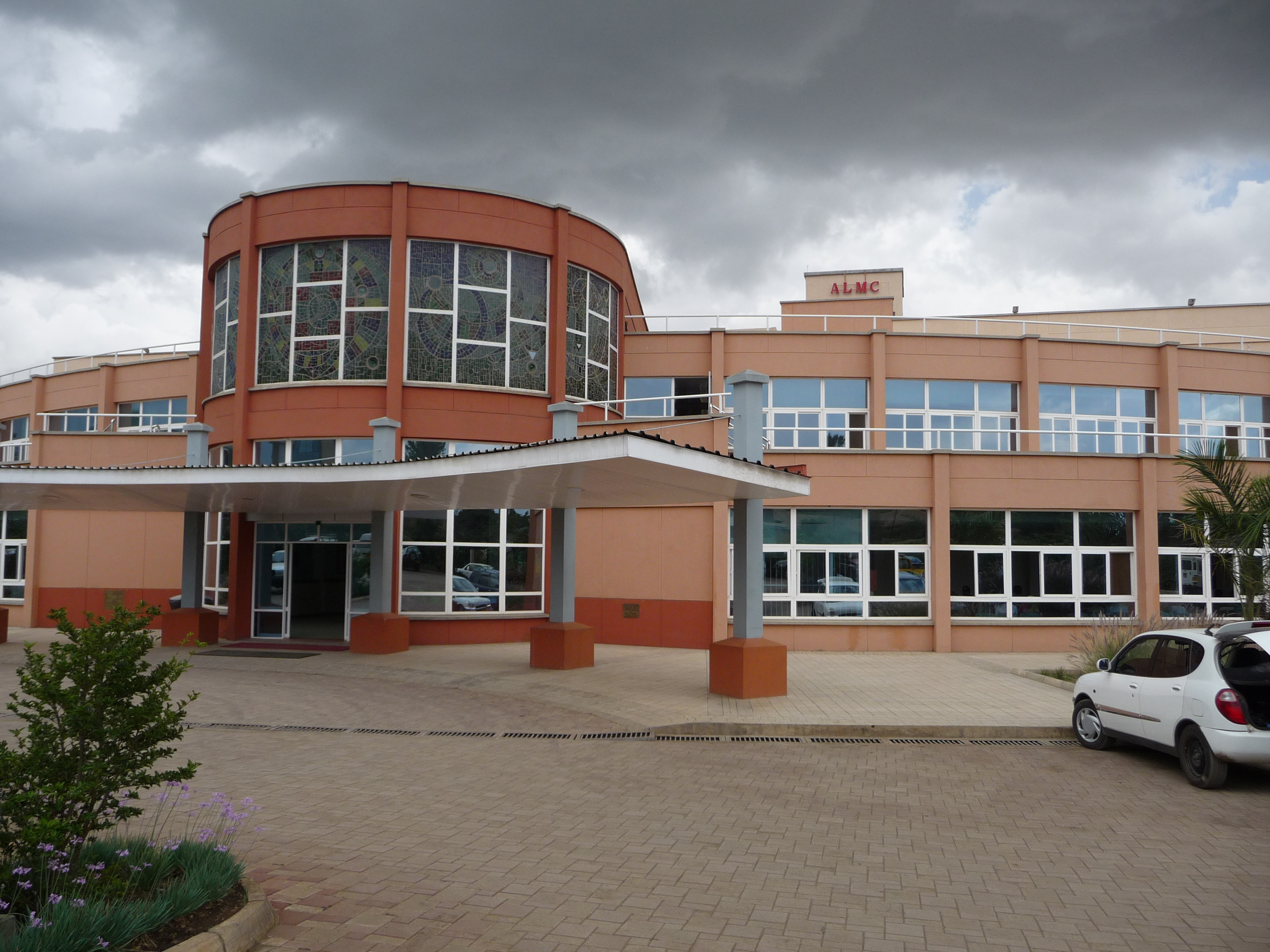 ALMC Hospital in Arusha, Tanzania